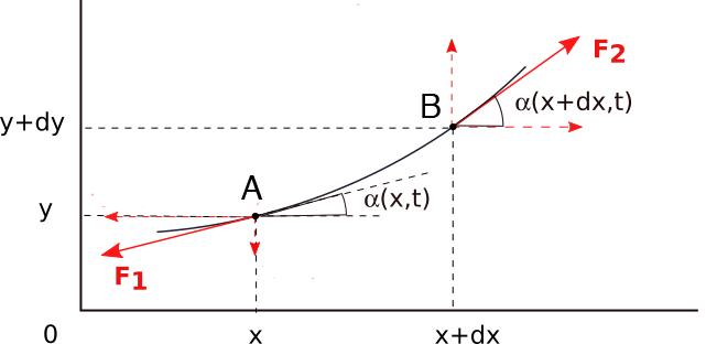 Géométrie du problème dans l'établissement de l'équation de propagation